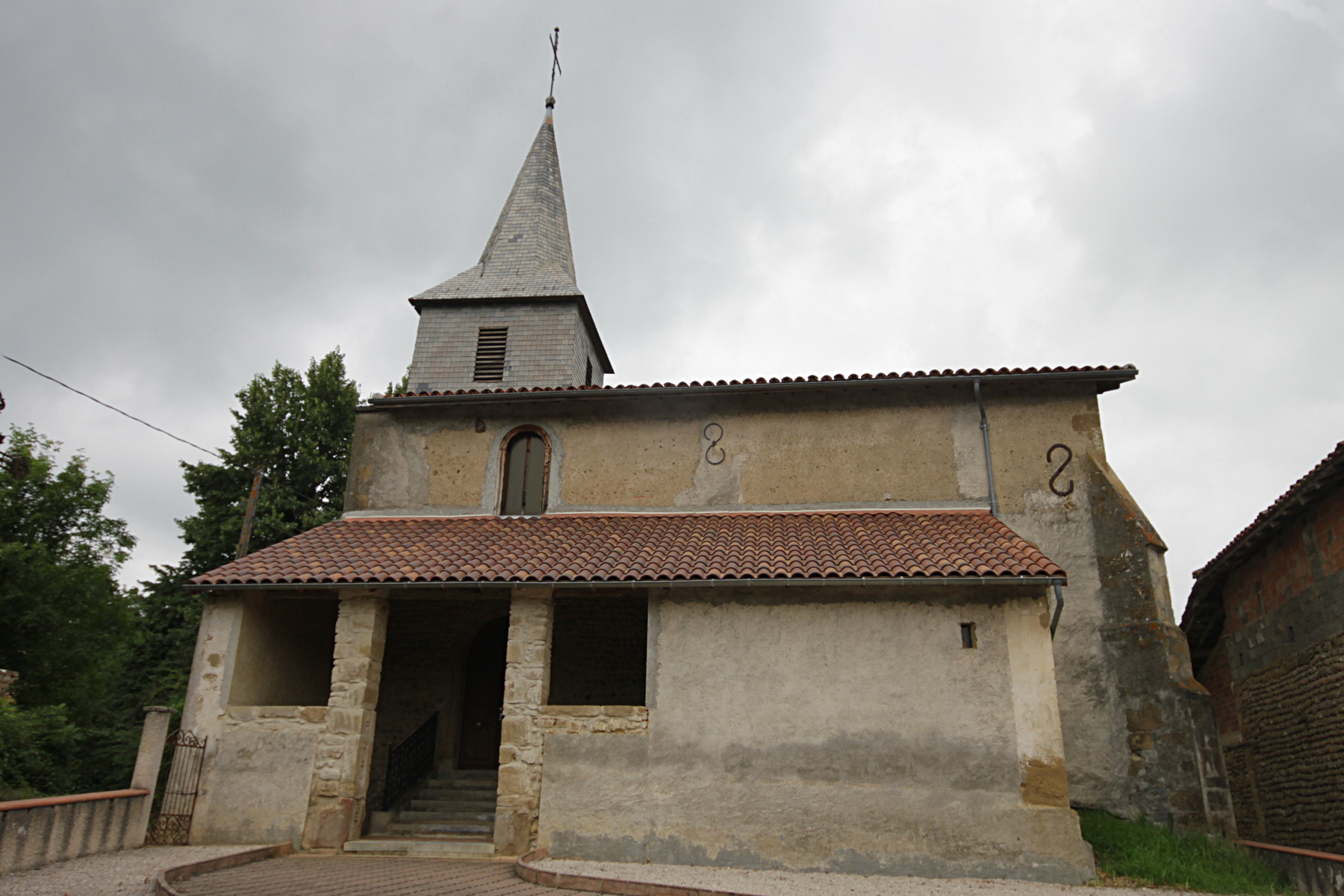 L'Église à 65368 Pouy, Hautes-Pyrénées